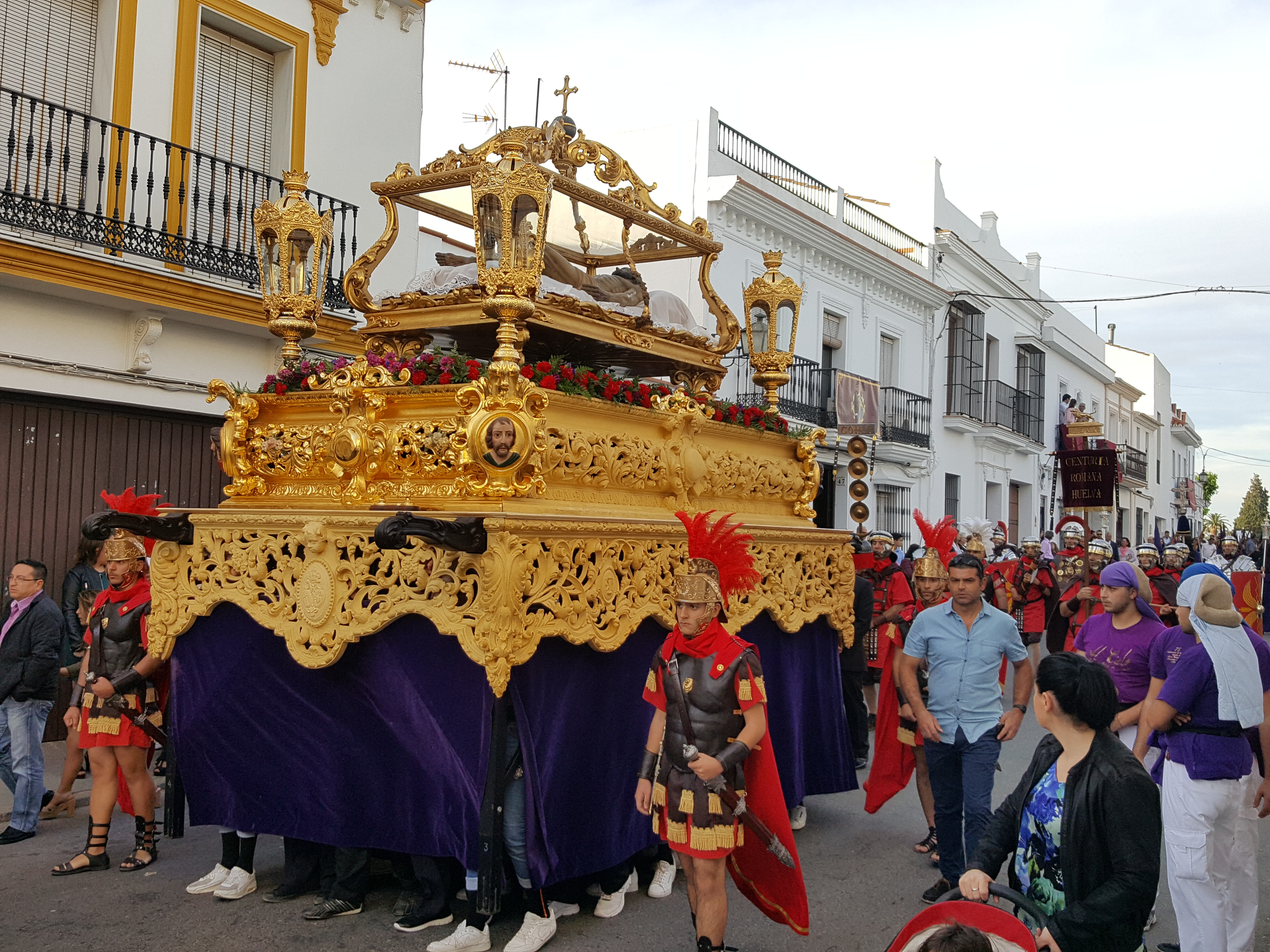 Hermandad del Santo Entierro. Desfile procesional del Sábado Santo. Vista de paso del Santo Entierro por el casco urbano de Moguer.